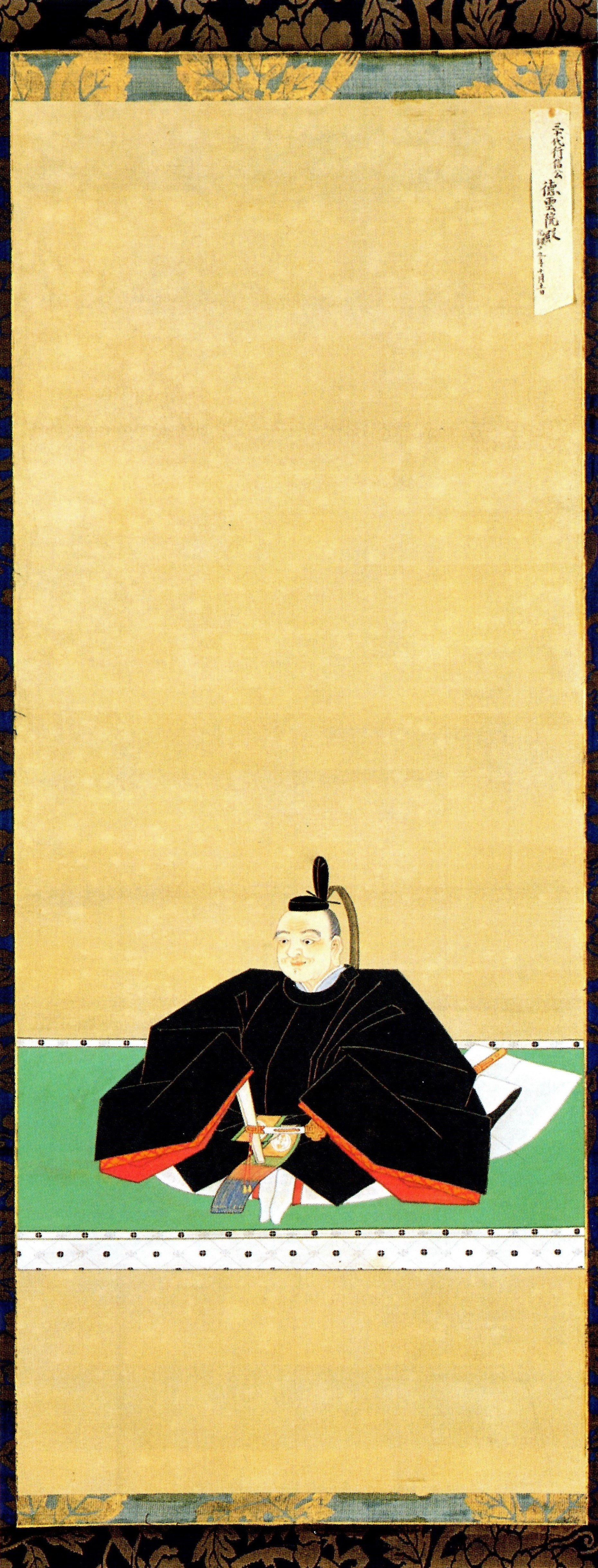 南部行信の肖像。